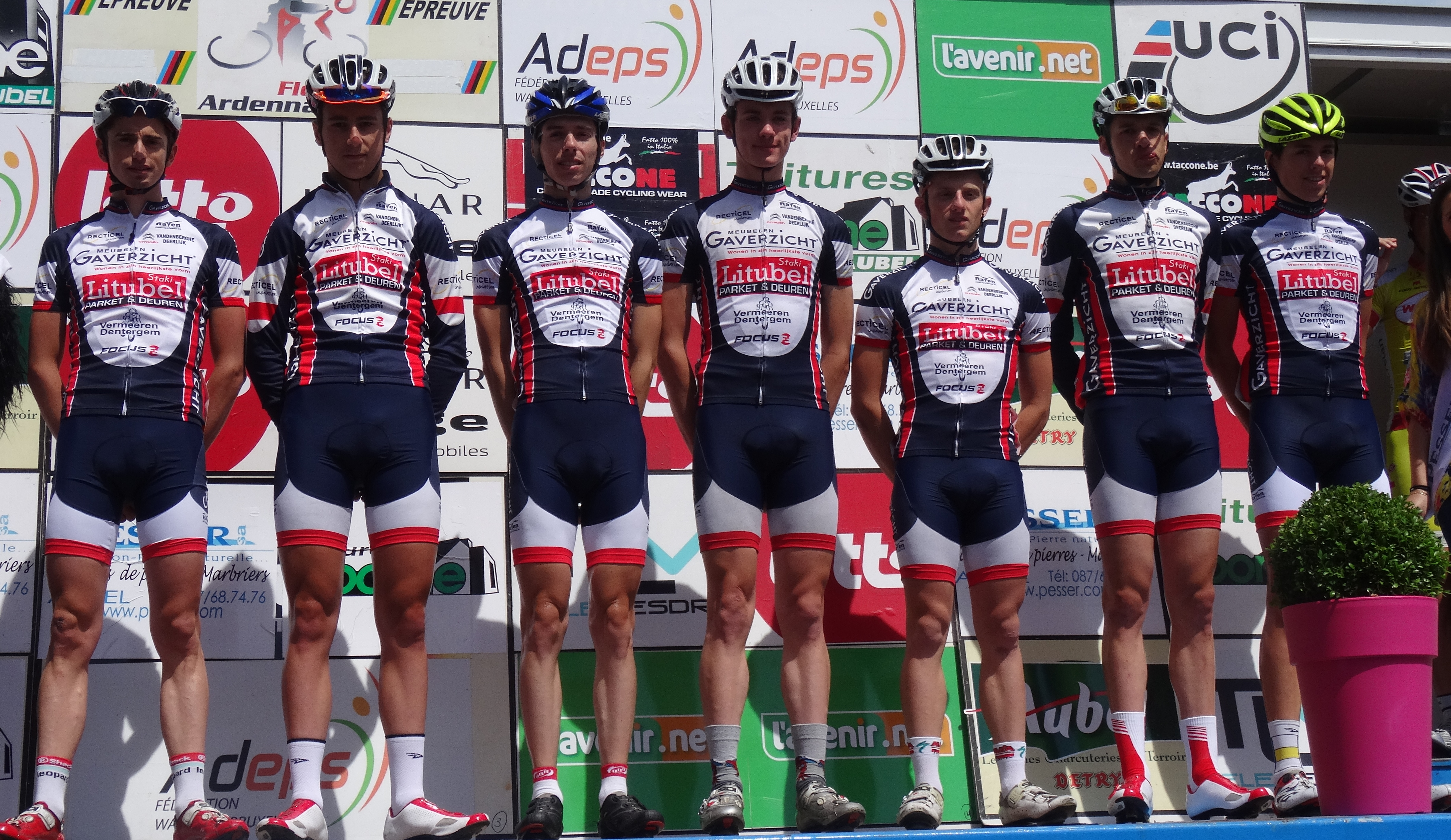 Reportage photographique réalisé le dimanche 22 juin à l'occasion du départ et de l'arrivée de la Flèche ardennaise 2014 à Herve, Belgique.